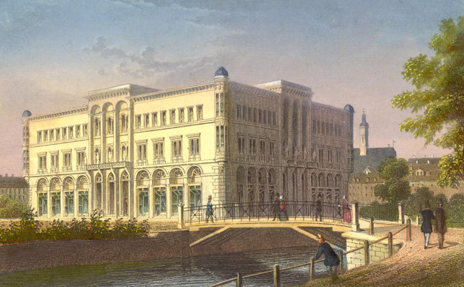 Die Central-Halle in Leipzig am Pleißemühlgraben. Im Hintergrund die Neukirche (später Matthäikirche)